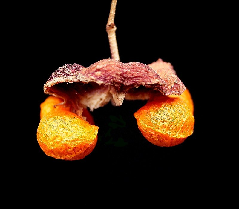 Euonymus europaeus